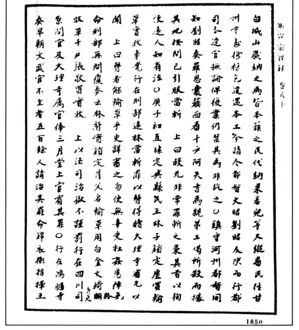 Ming shi lu